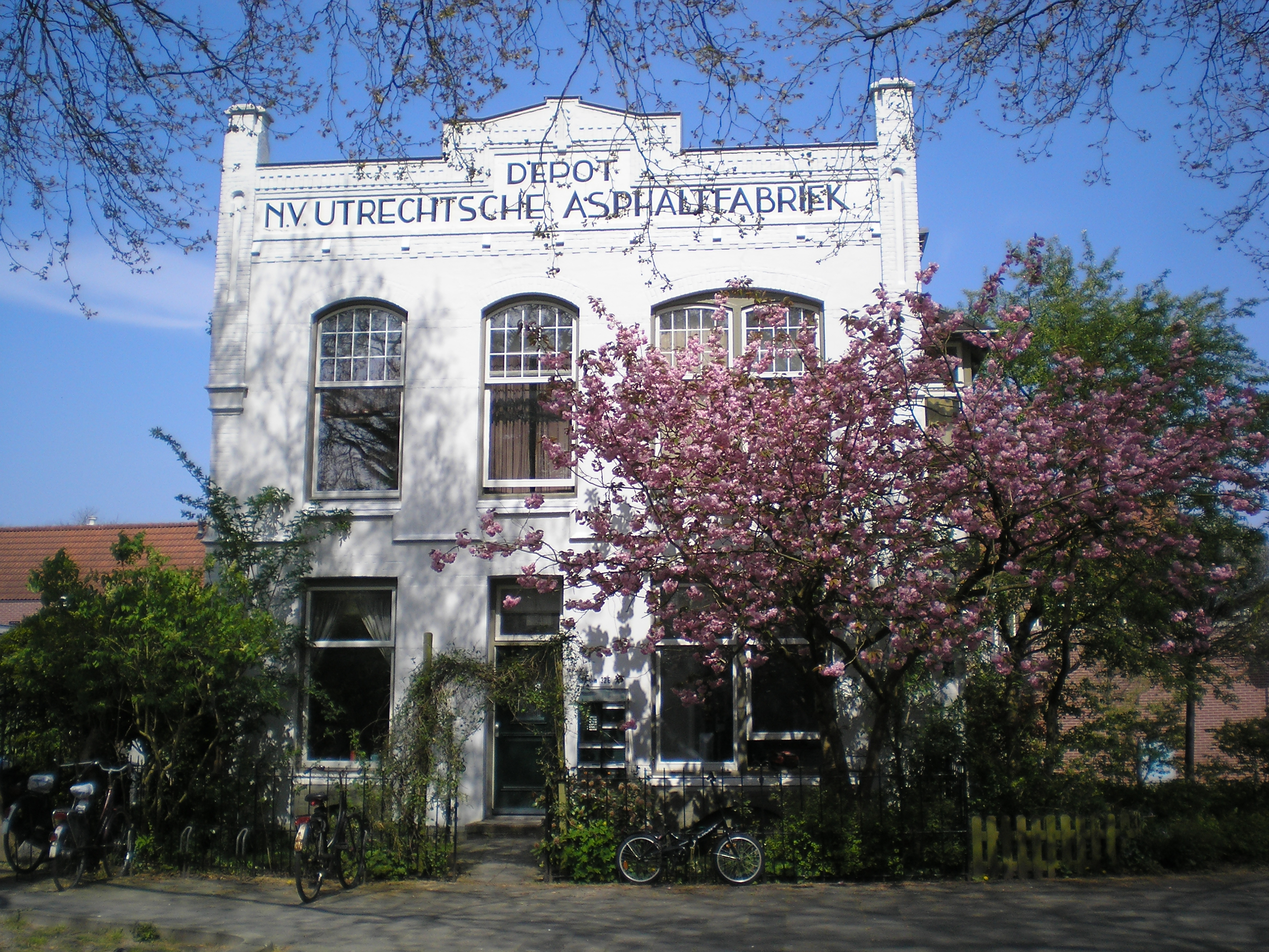 Utrechtsche Asphaltfabriek aan de Gansstraat 132 te Utrecht in Nederland